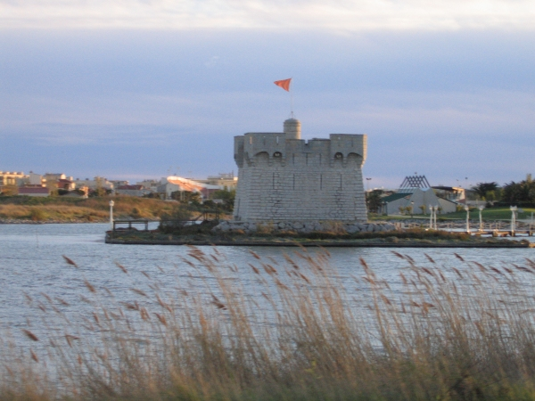 Description: Redoute de Ballestras, Palavas-les-Flots, Hérault, France. Il s'agit de l'une des huit tours d'alarme construites en 1774 pour prévenir la population contre les pirates. De 1906 à 1943, la redoute est recouverte par un château d'eau qui la masque complètement. Entre 1991 et 1993 elle est déplacée pierre par pierre jusqu'à l'Étang du Levant et restaurée. Source: Hugo Soria Licence: GFDL Hugo Soria